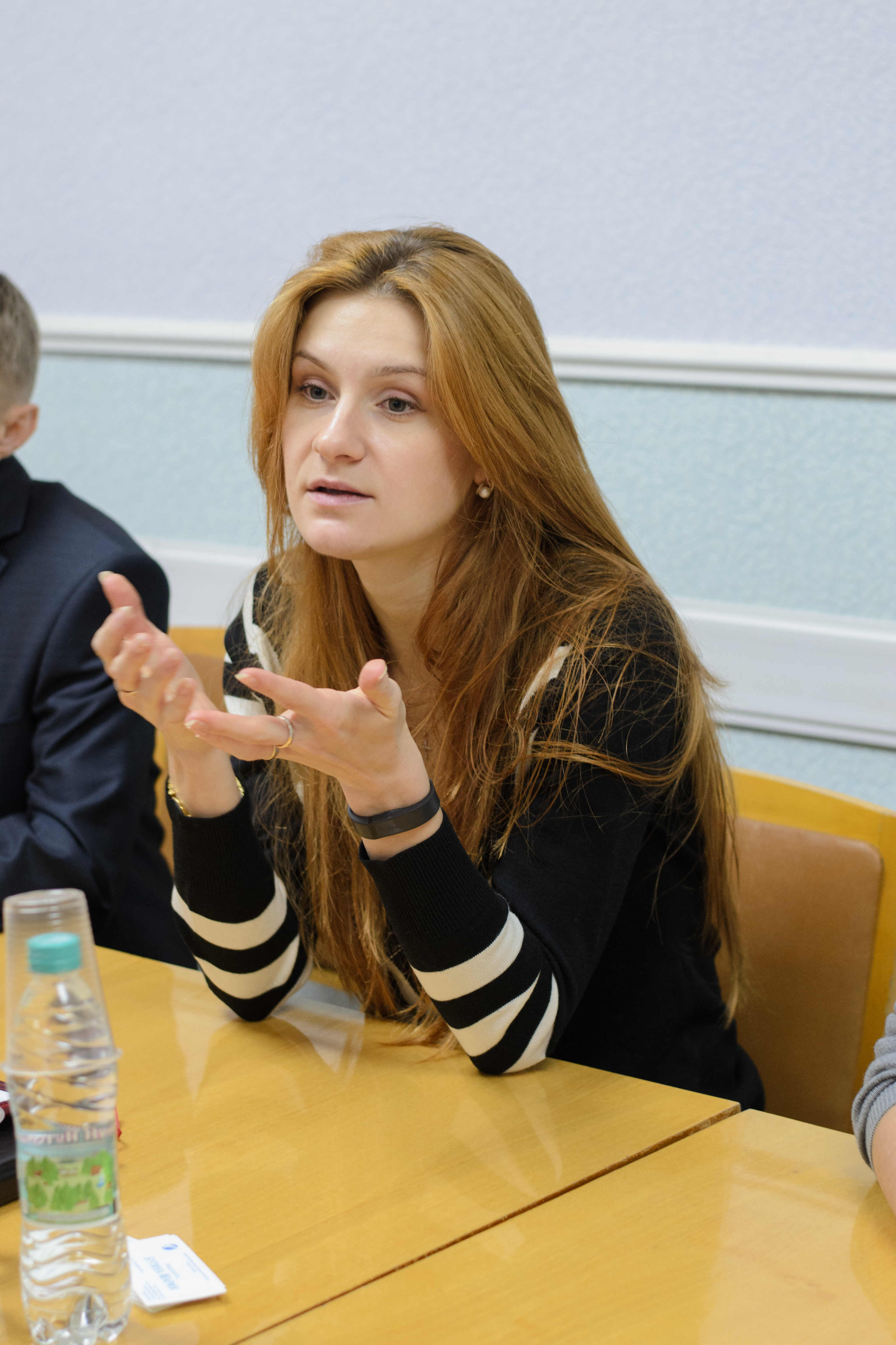 Мария Бутина, основатель и член правления общероссийской общественной организации "Право на оружие"